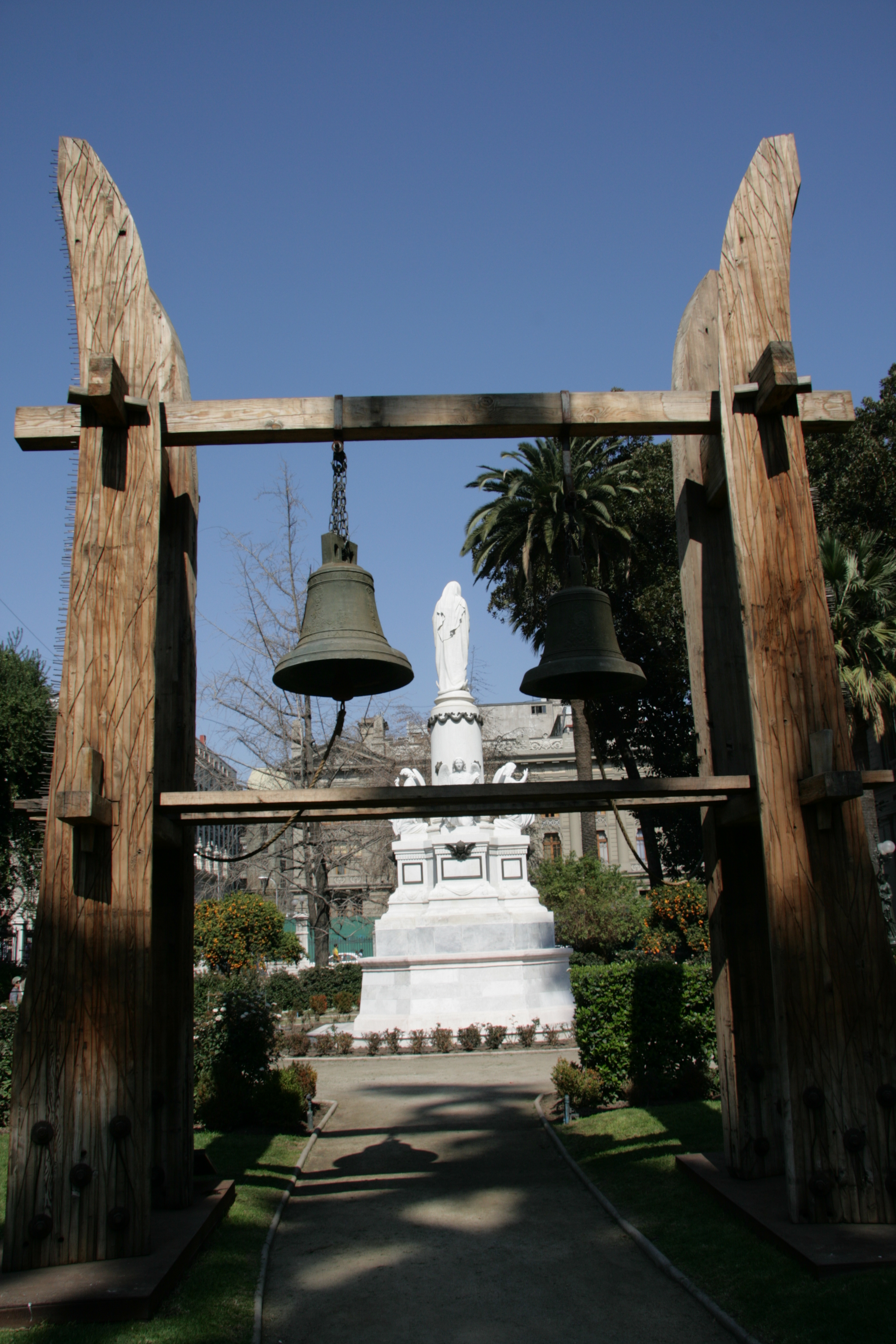 Ex Congreso Nacional y sus jardines This is a photo of a national monument in Chile: 835